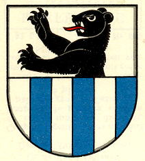 Wappen von Sergey Kanton Waadt Schweiz